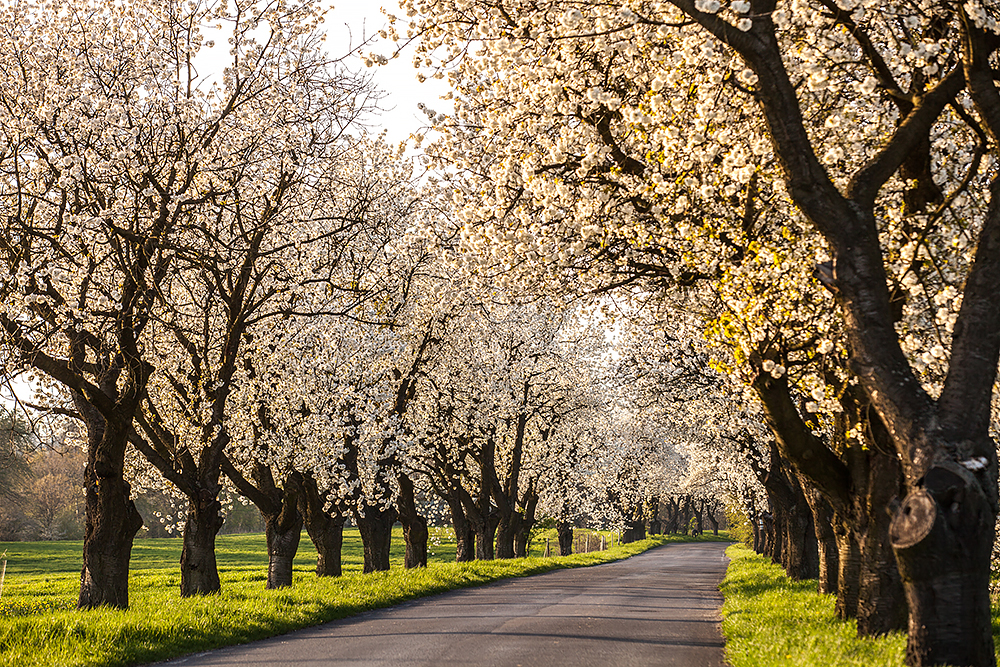 Kwitnąca aleja czereśniowa, która przyciąga wielu fotografów. Aleja zakwita zazwyczaj w połowie kwietnia na maksymalnie 2 tygodnie.